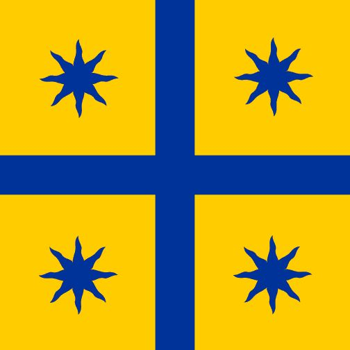 Bandiera dell'esercito della famiglia degli Argiri (1000 circa), usata da Romano III Argiro.